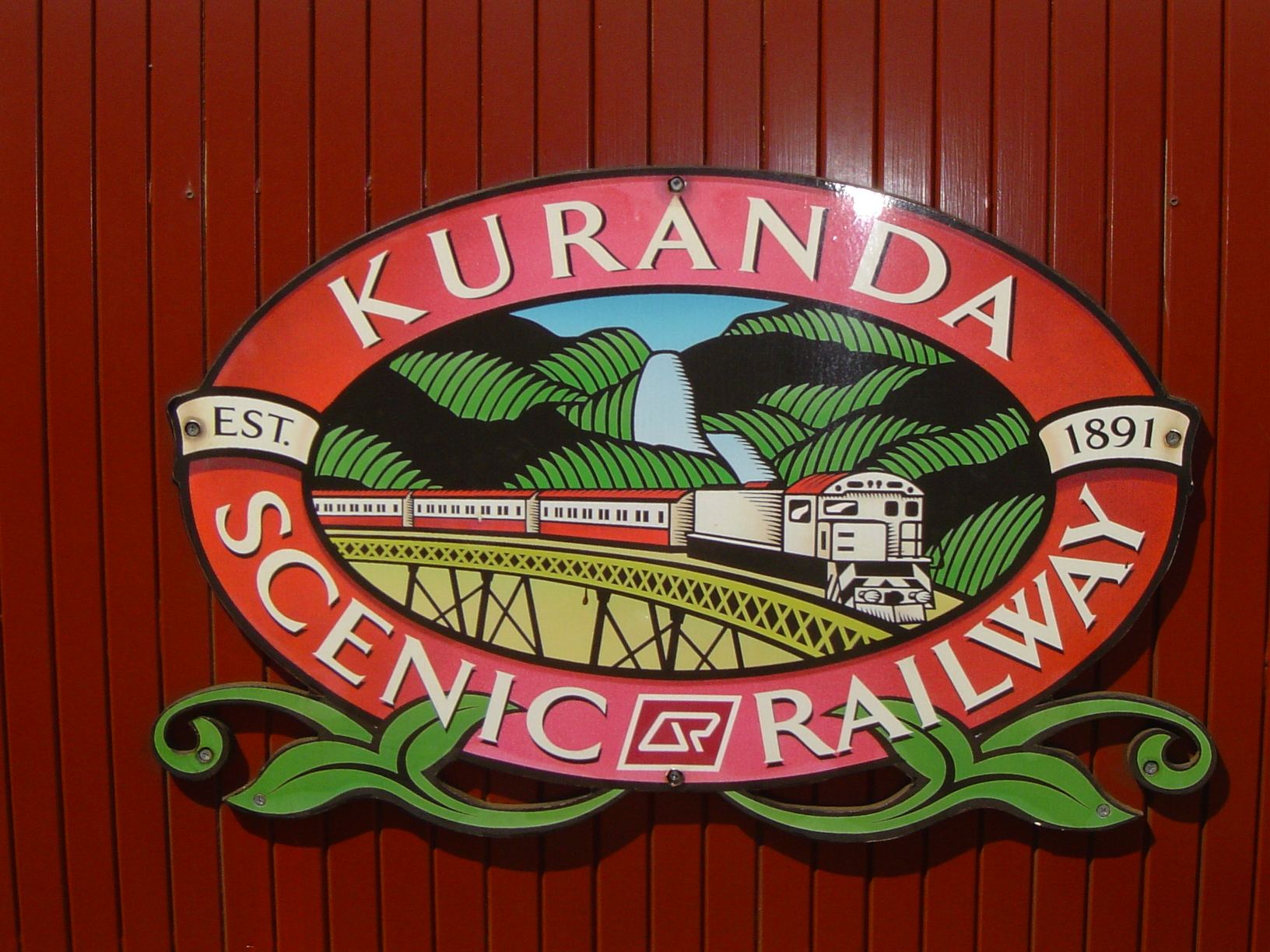 Kuranda scenic railway - Cairns - Kuranda - Australia - september 2006